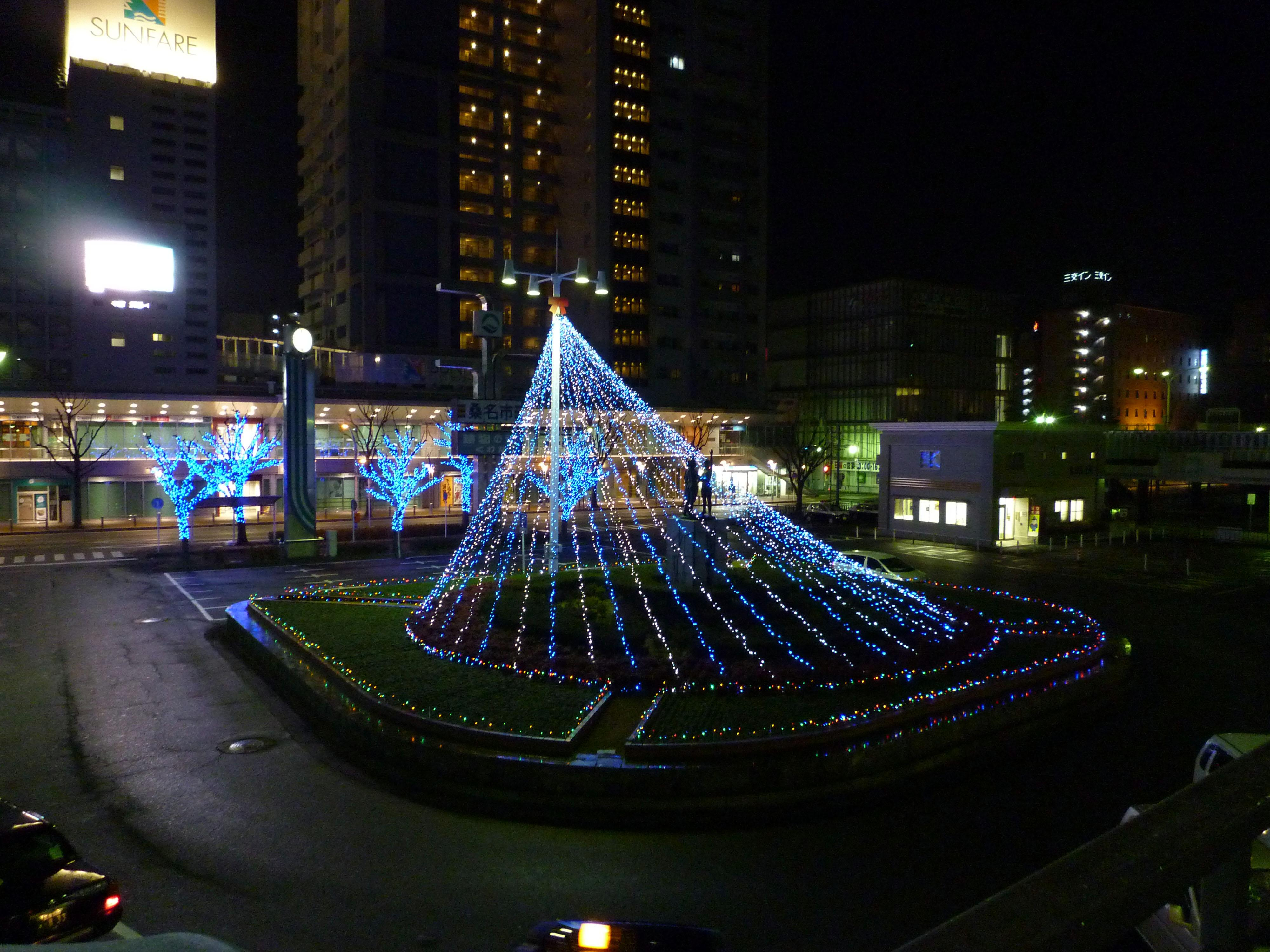 桑名駅東口前広場